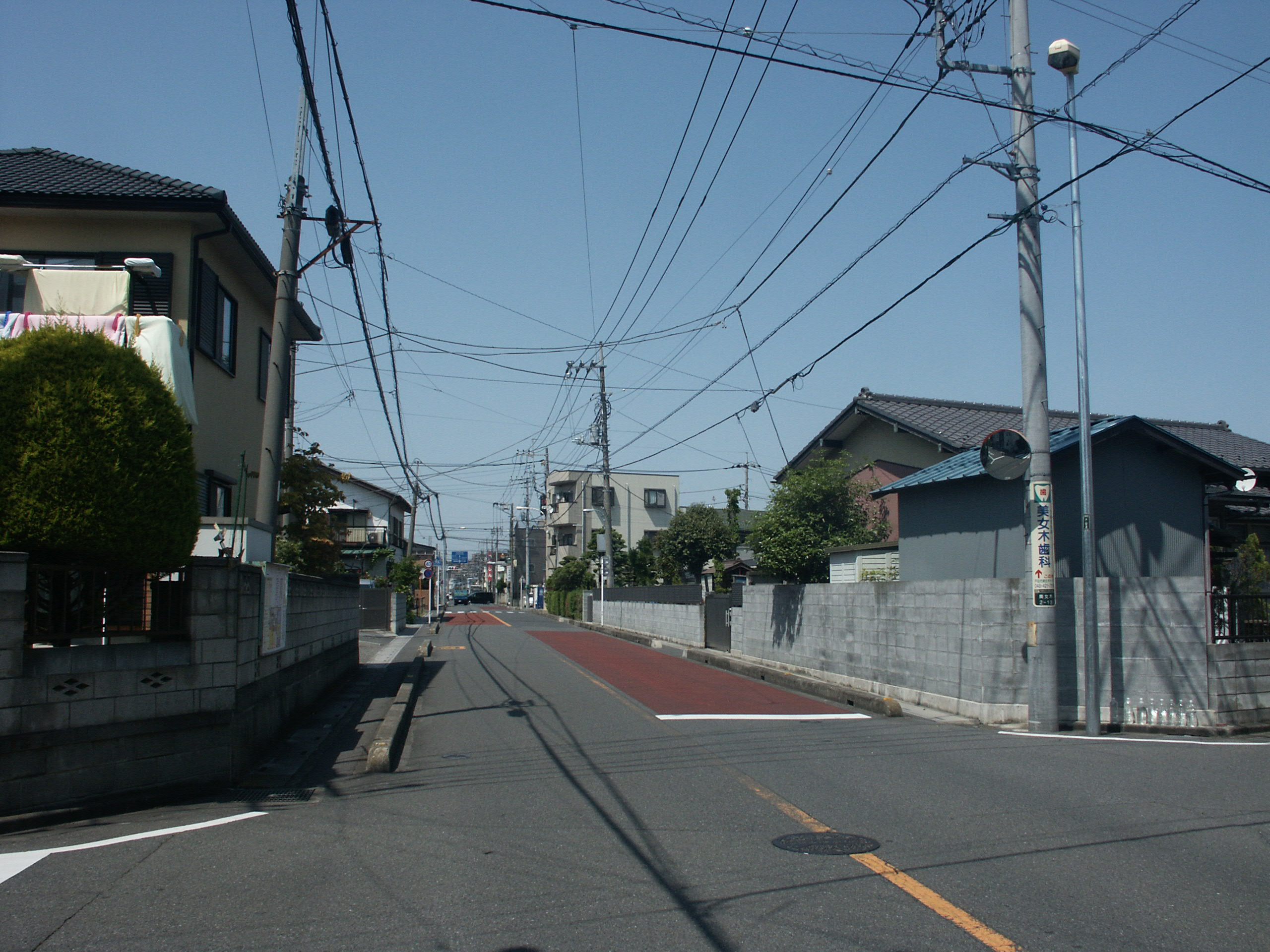 埼玉県道382号線 戸田市美女木2丁目付近（単独区間さいたま市方面を撮影）